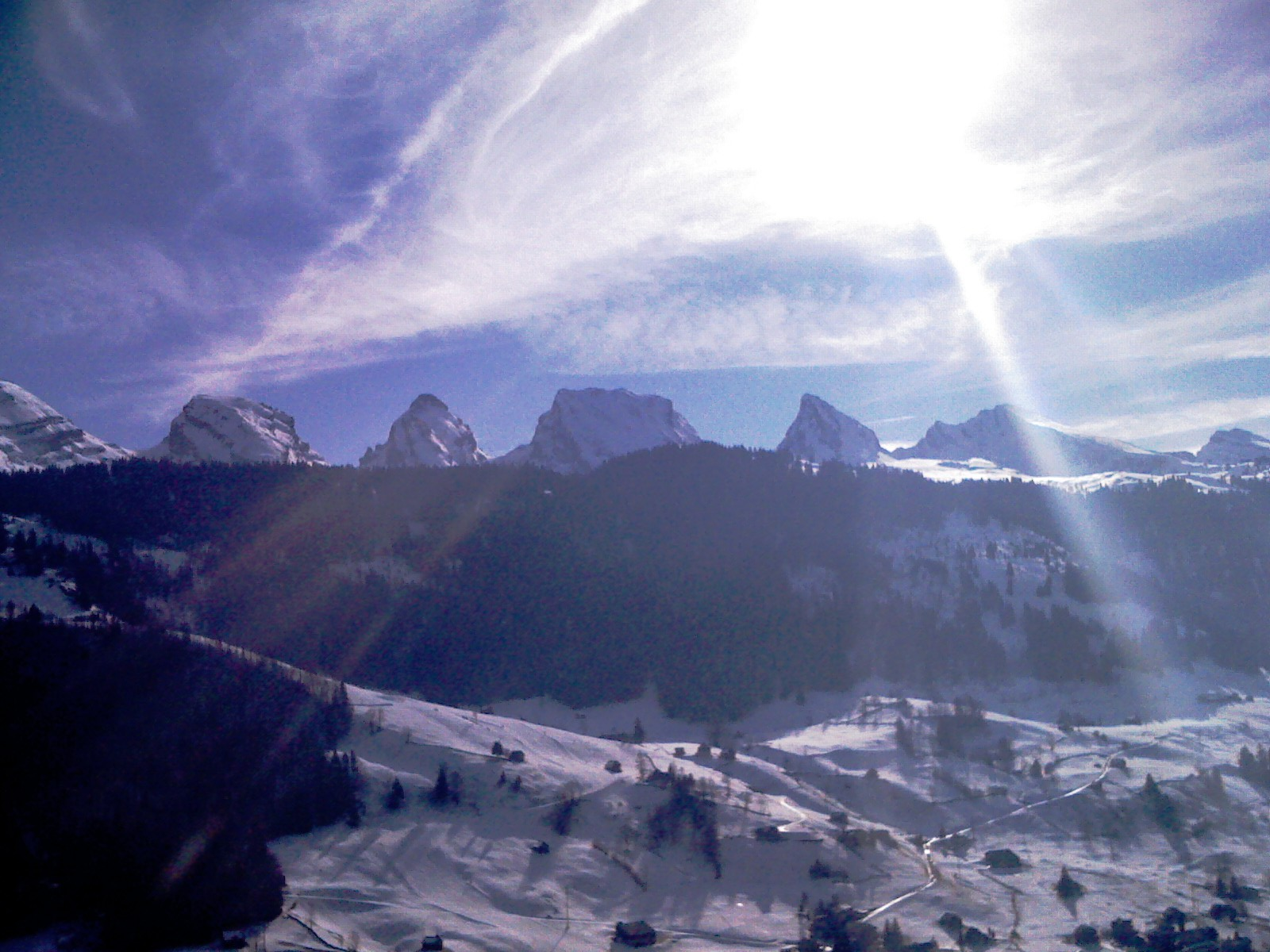 Churfirsten seen from Toggenburg, Switzerland, in vinter - Churfirsten vidita de Togenburgo, Svislando, en vintro